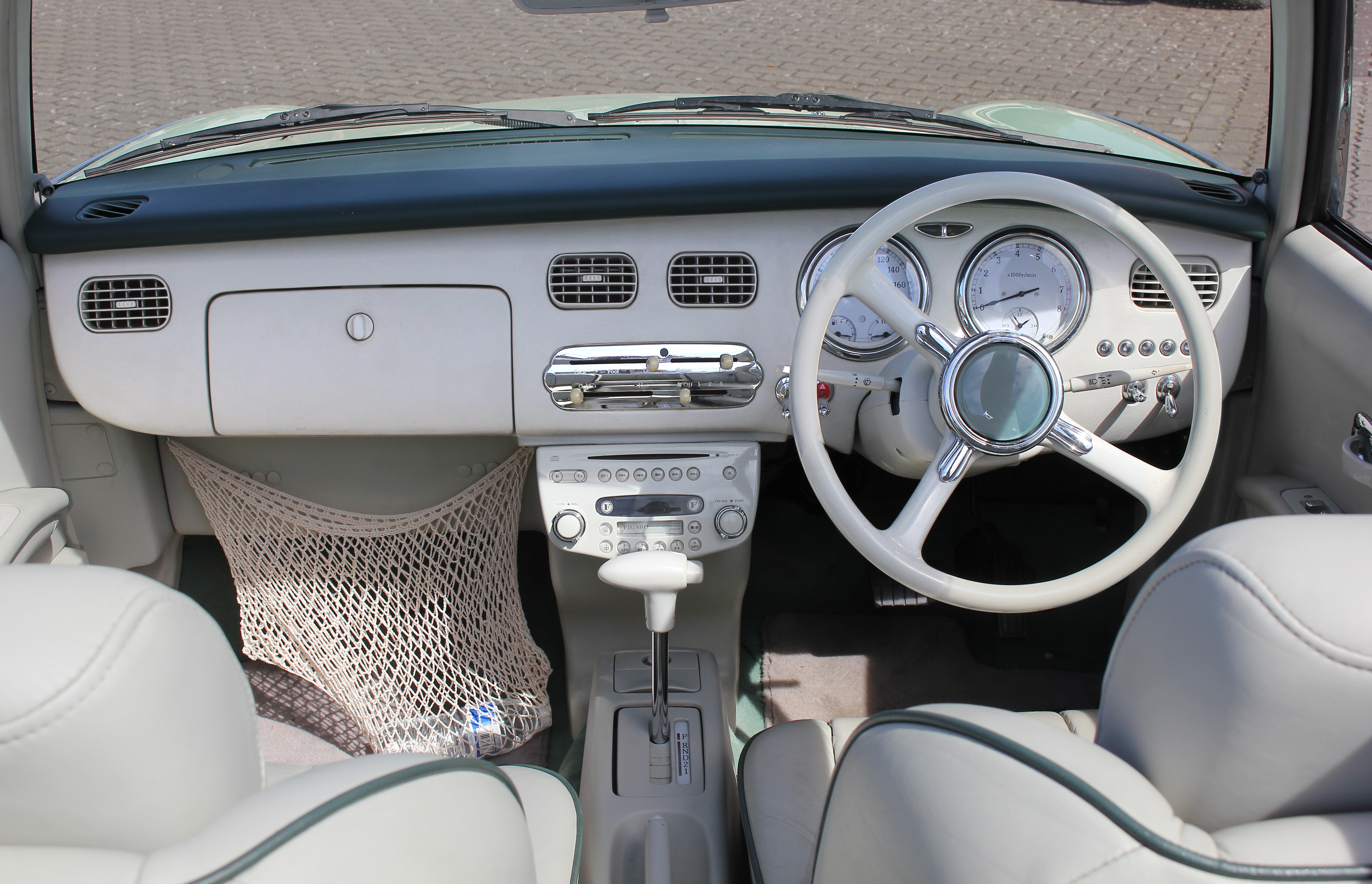 Lenkrad und Armaturenbrett eines Nissan Figaro, Baujahr 1991